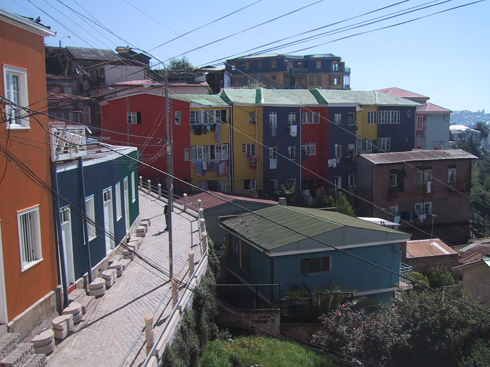 Valparaiso, Chile